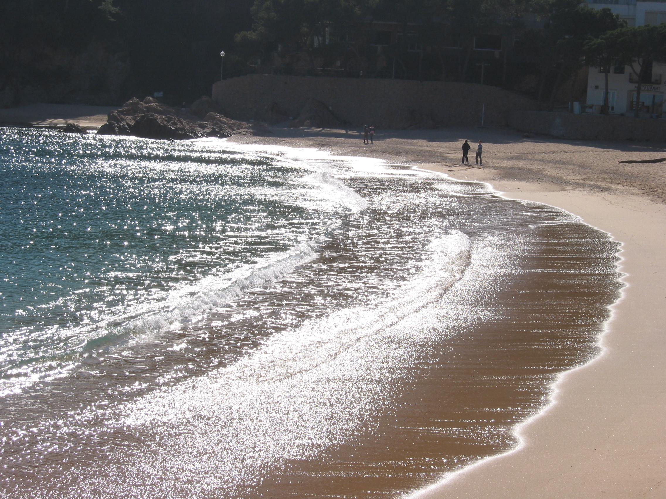 Tamariu Beach